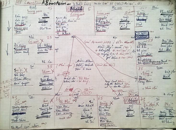 A.Einstein2